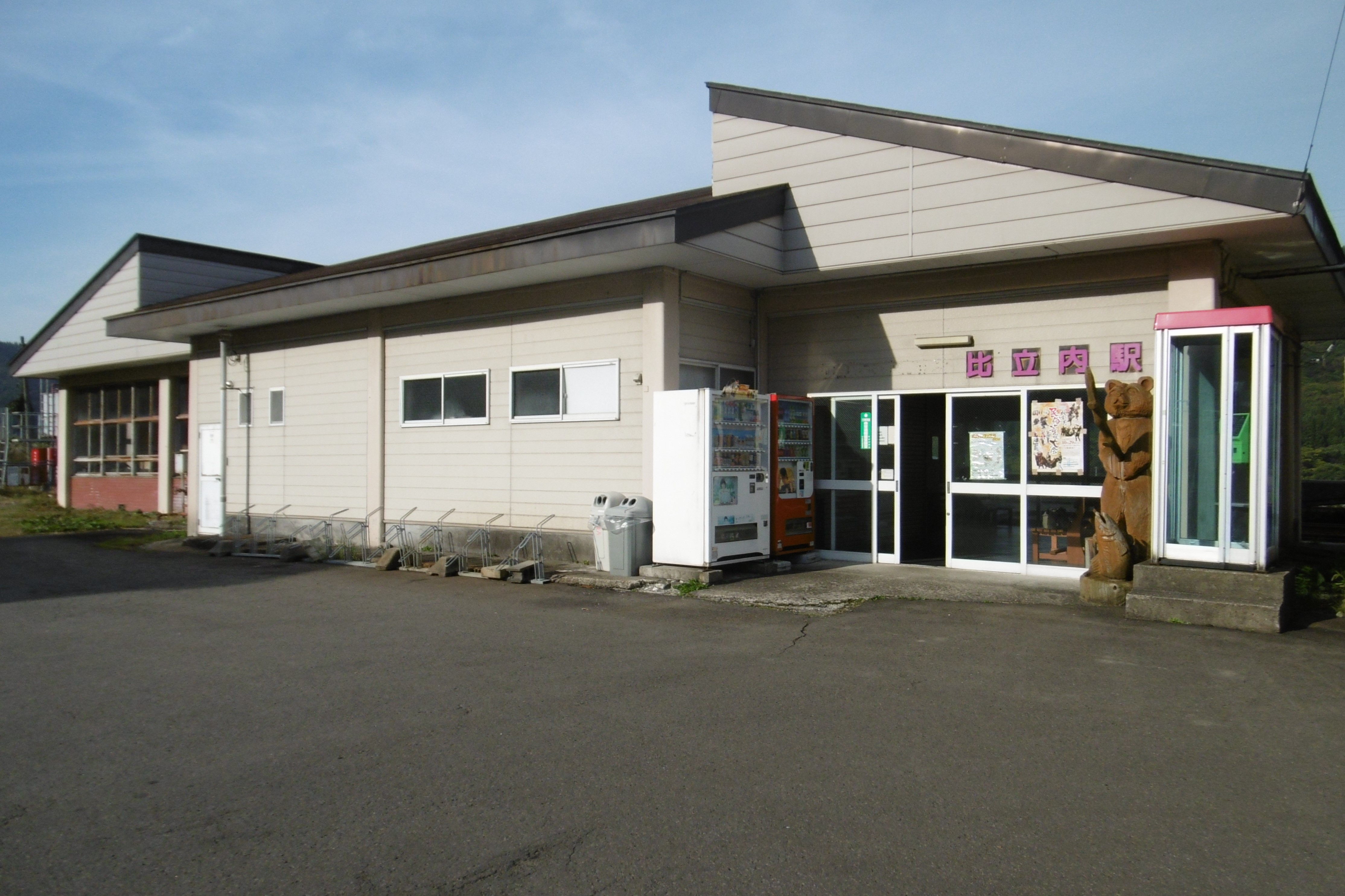 秋田内陸線 比立内駅 駅舎